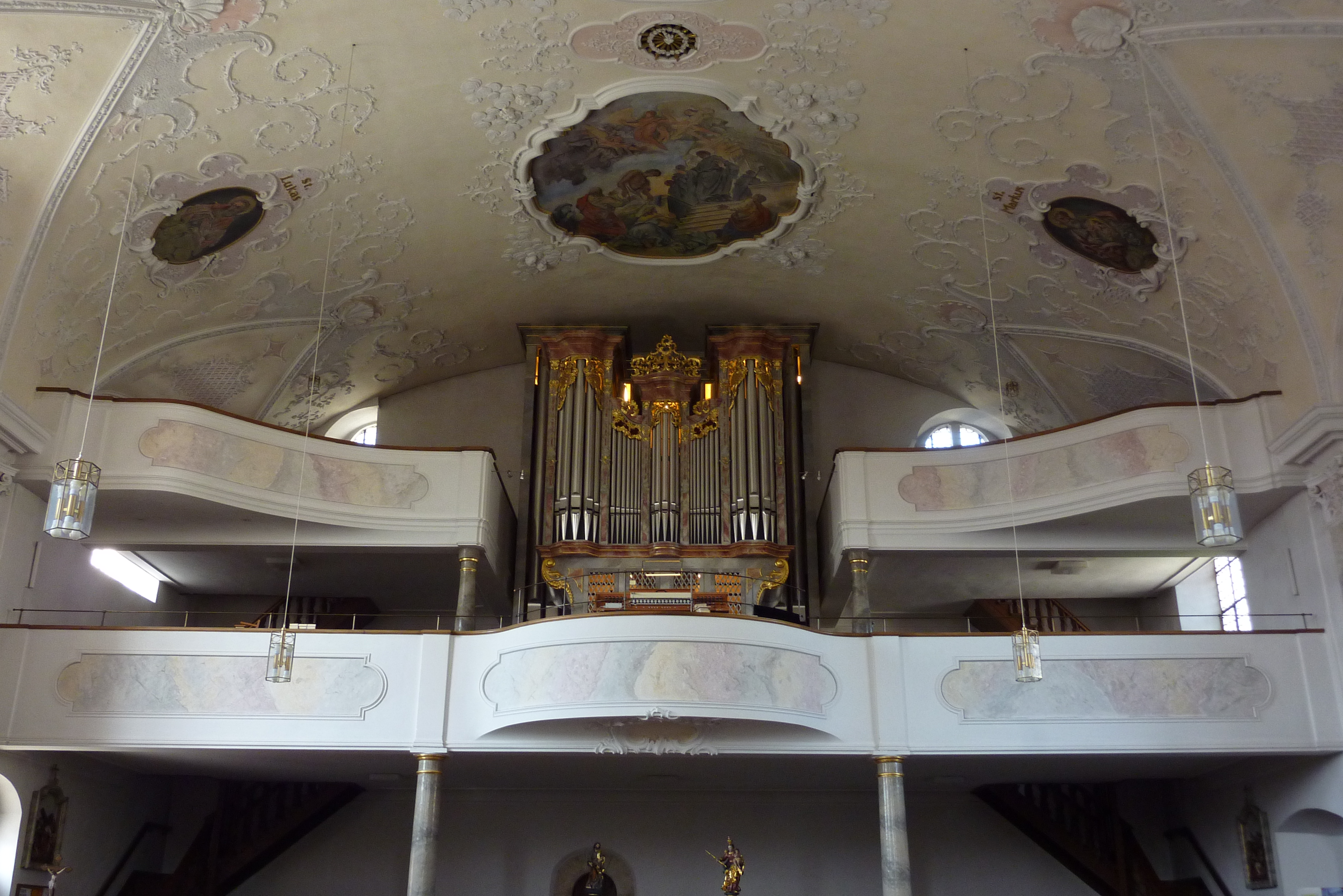 katholische Stadtpfarrkirche St. Martin in Gundelfingen an der Donau